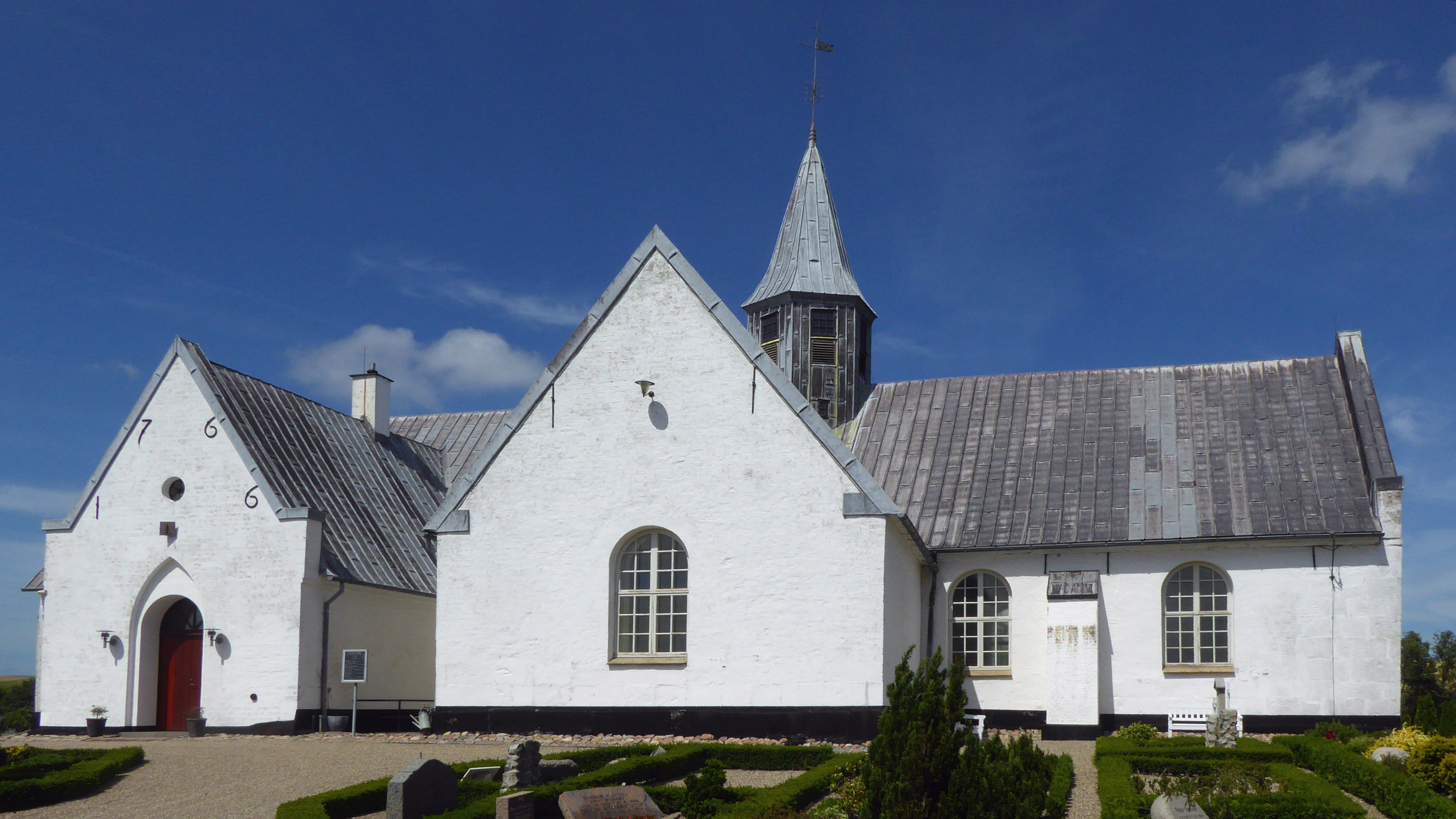 Kirche von Hoptrup aus dem 13. - 15. Jh Sønderjylland Südjütland Kirchspiel Hoptrup Domprobstei Haderslev Dänemark Foto 2018 Wolfgang Pehlemann P1210676